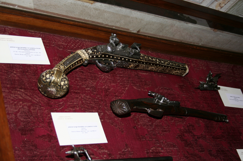 Pistole a focile e a ruota, XVII sec., Palazzo Duranti-Marzoli, Palazzolo sull'Oglio.